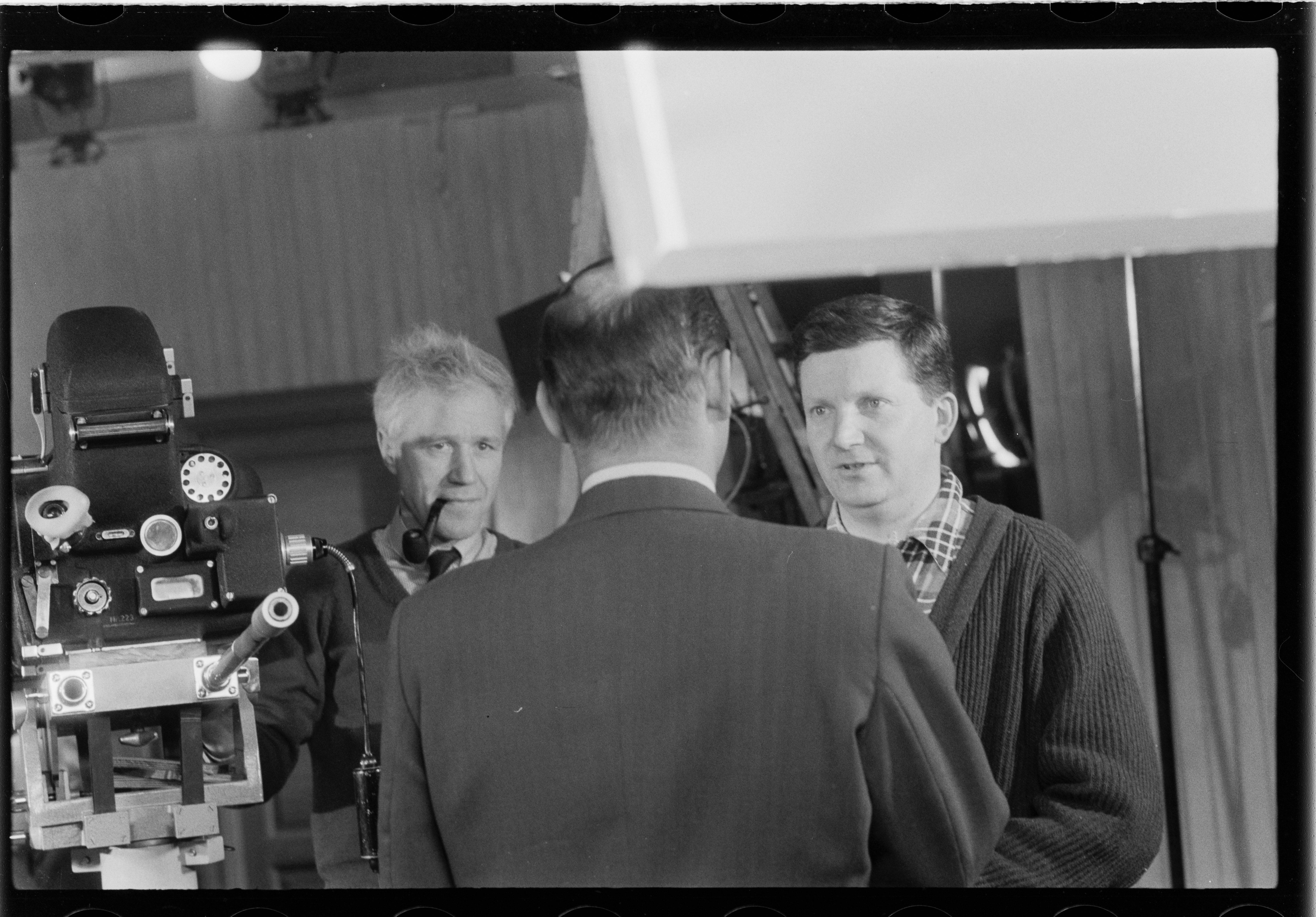 Bildet er hentet fra Arkivverket. Foto tatt i forbindelse med reportasje om den norske filmen Freske fraspark fra 1963. Manus var ved Kjell Aukrust og Bjørn Breigutu. Regi ved Bjørn Breigutu. Kjell Aukrust, Leif Juster, Turid Caldwell, Alfhild Hovdan, Per Bistrup, Lalla Carlsen Arkivinstitusjon : Riksarkivet Arkivnavn : Billedbladet NÅ Sted : Norge, Ukjent, Ukjent, Ukjent Emneord: Menn, Filminnspilling Avbildet: Ukjent